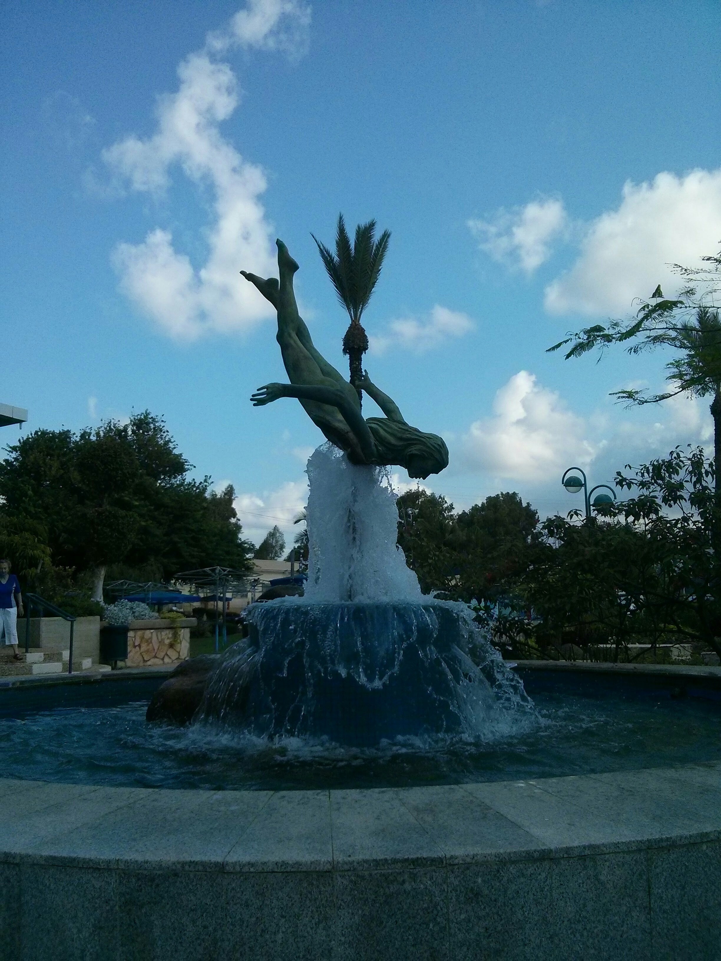 פסלו של ריצ'רד שילה בקאנטרי חולון